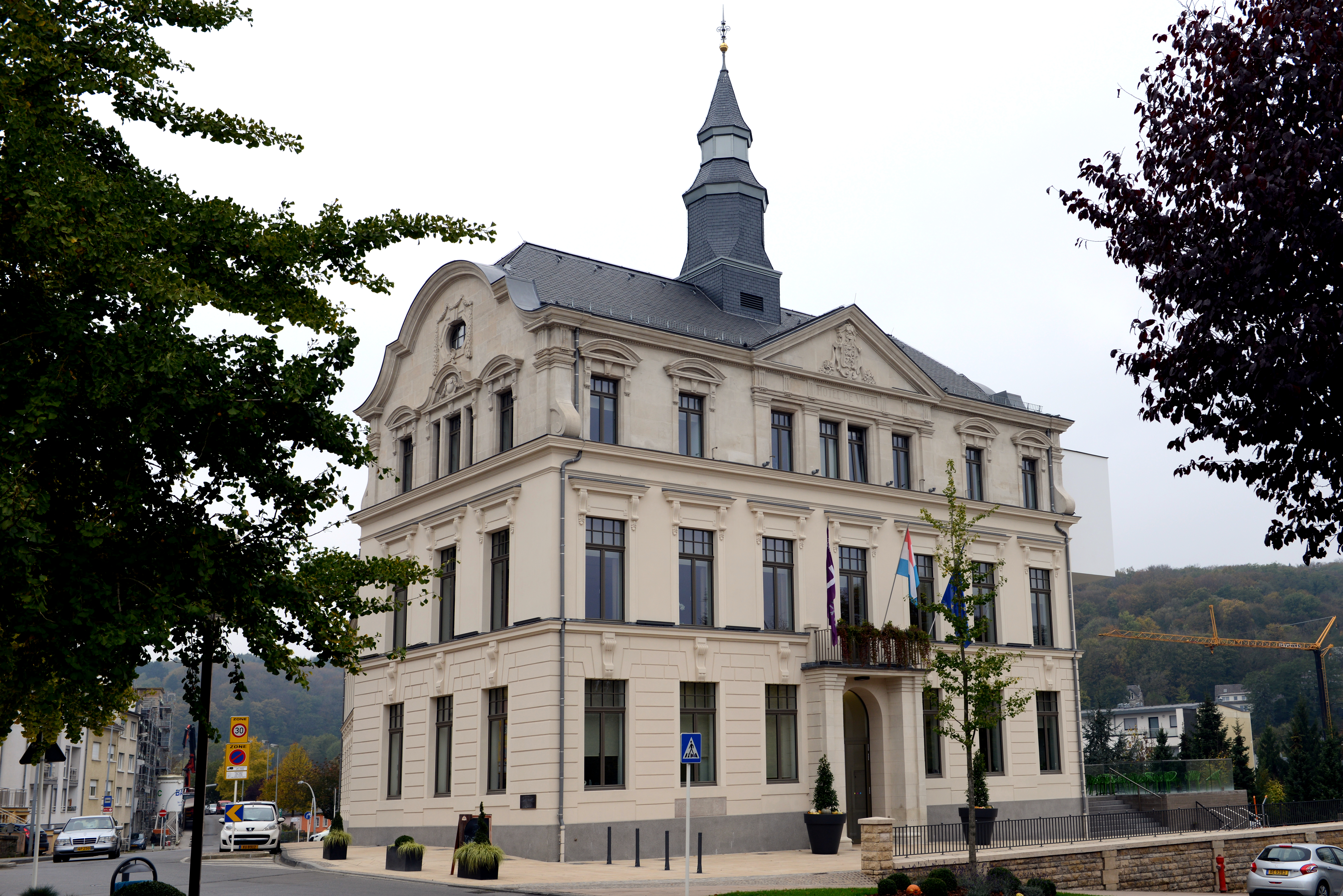 De Centre culturel "Aalt Stadhaus" zu Déifferdeng.